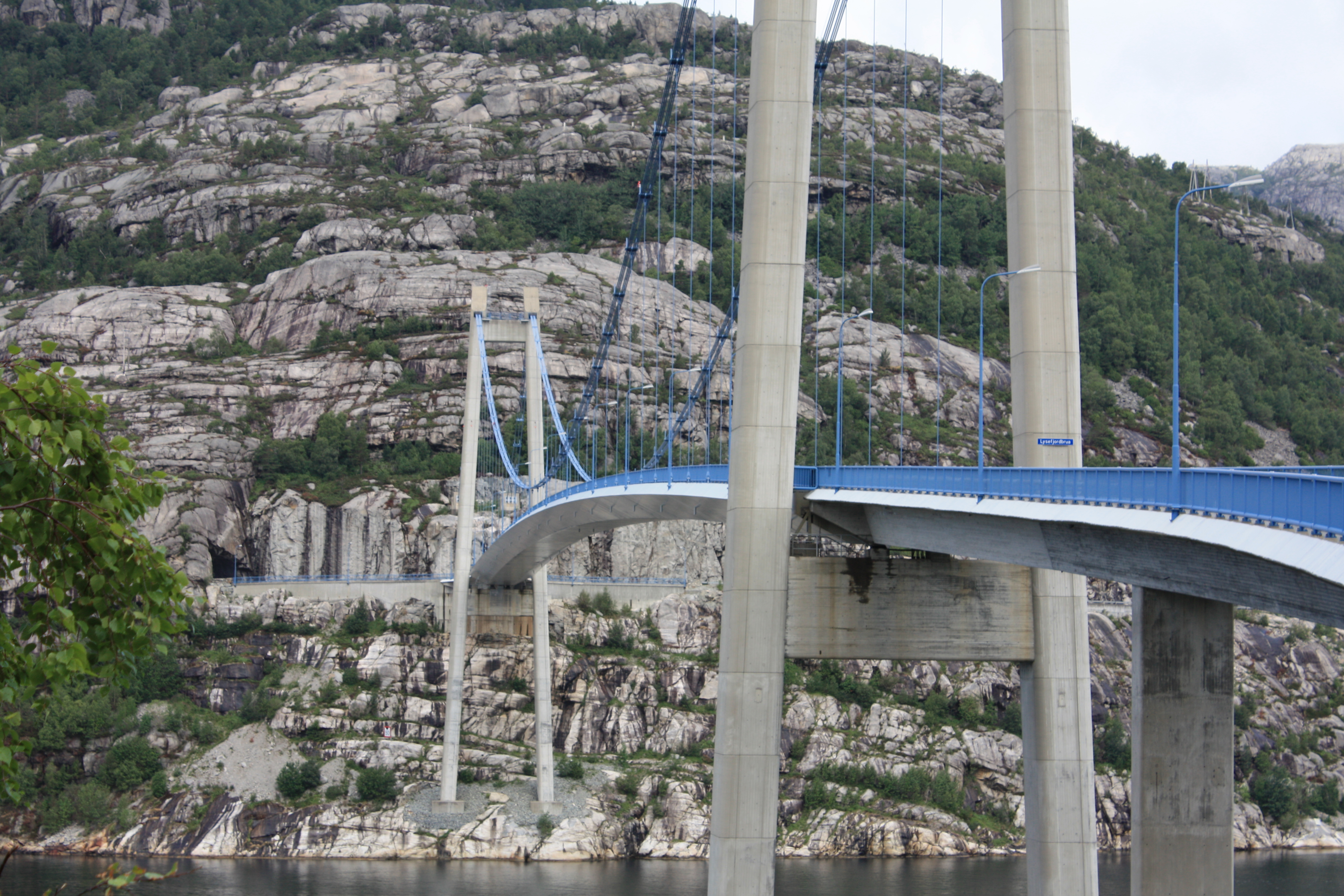 Lysefjordbrua over Lysefjorden.